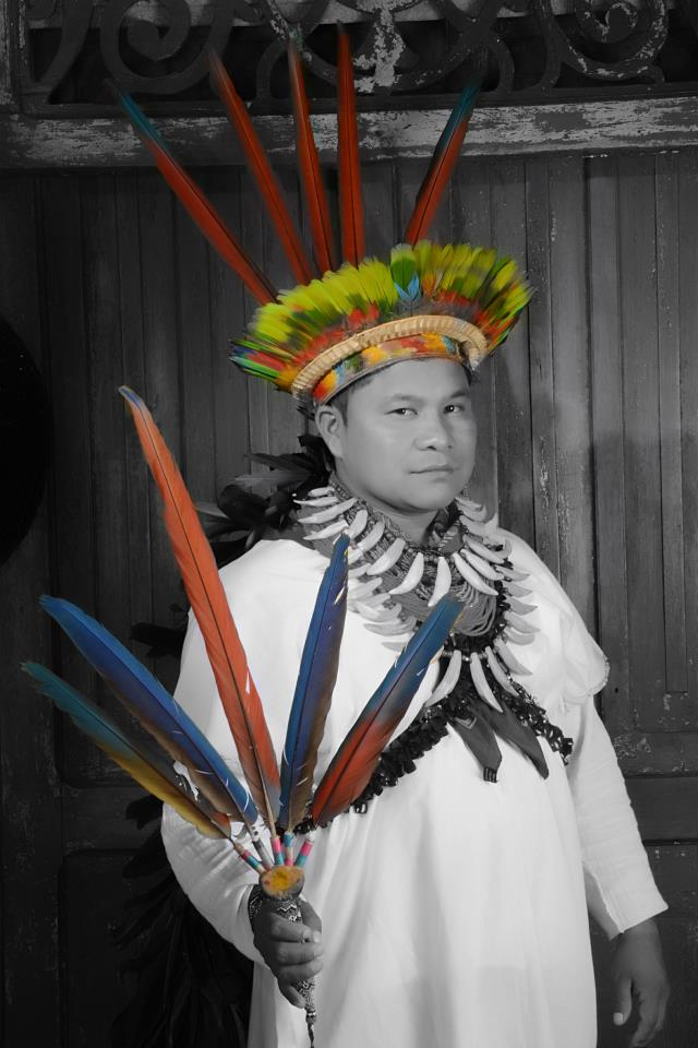 Autoridad Tradicional Indígena, Zippasgo Inga Chibcha Wuanentá Hunzaá, Curaca, Médico Tradicional, Gobernante Zacasgo Orinoco Amazonía, Centro y Sur Andino..